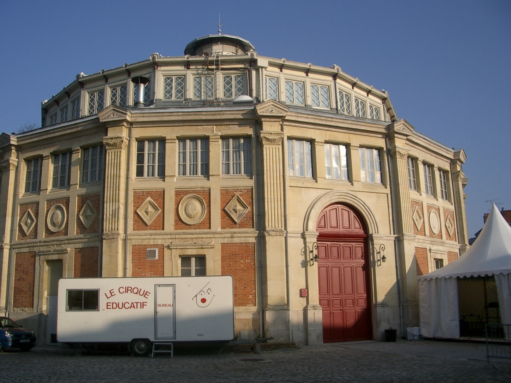 Cirque municipal de Reims (2 boulevard Général Leclerc, 51100)